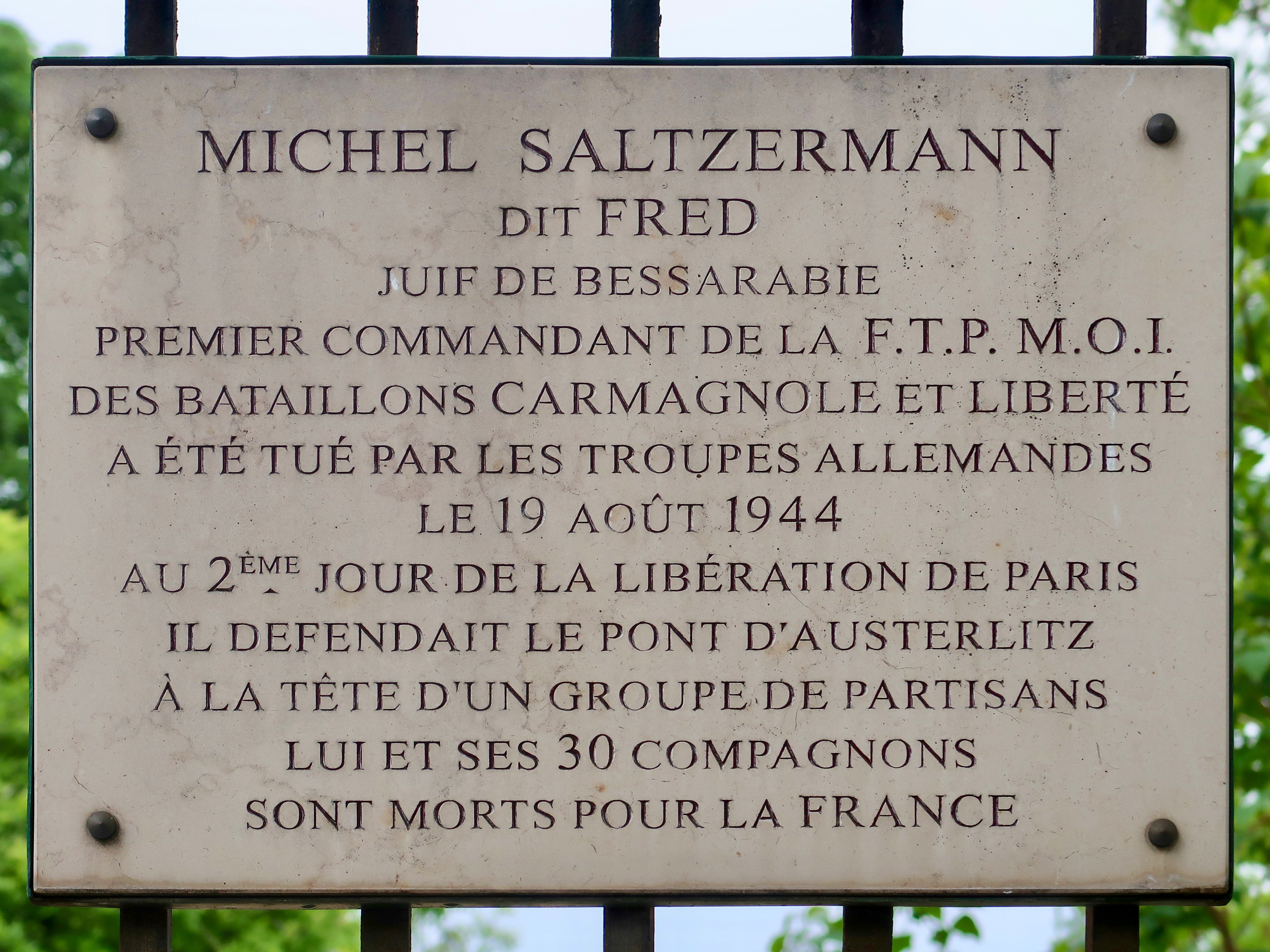 Plaque en hommage à Michel Saltzermann, mort pour la Libération de Paris, quai Saint-Bernard, devant le jardin des Plantes (Paris, 5e).